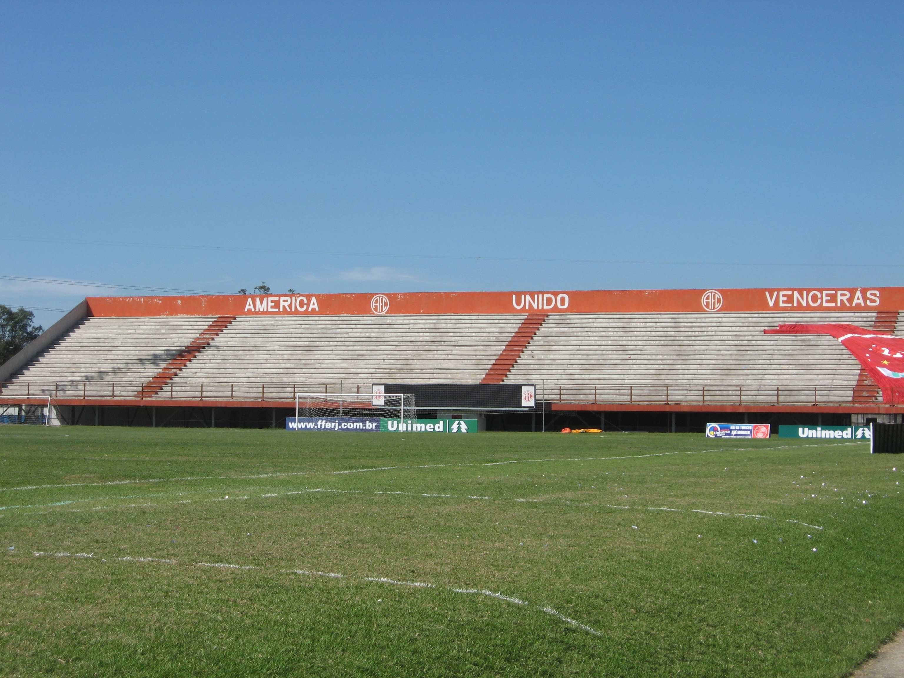 Detalhe do estádio Giulite Coutinho pertencente ao América FC.